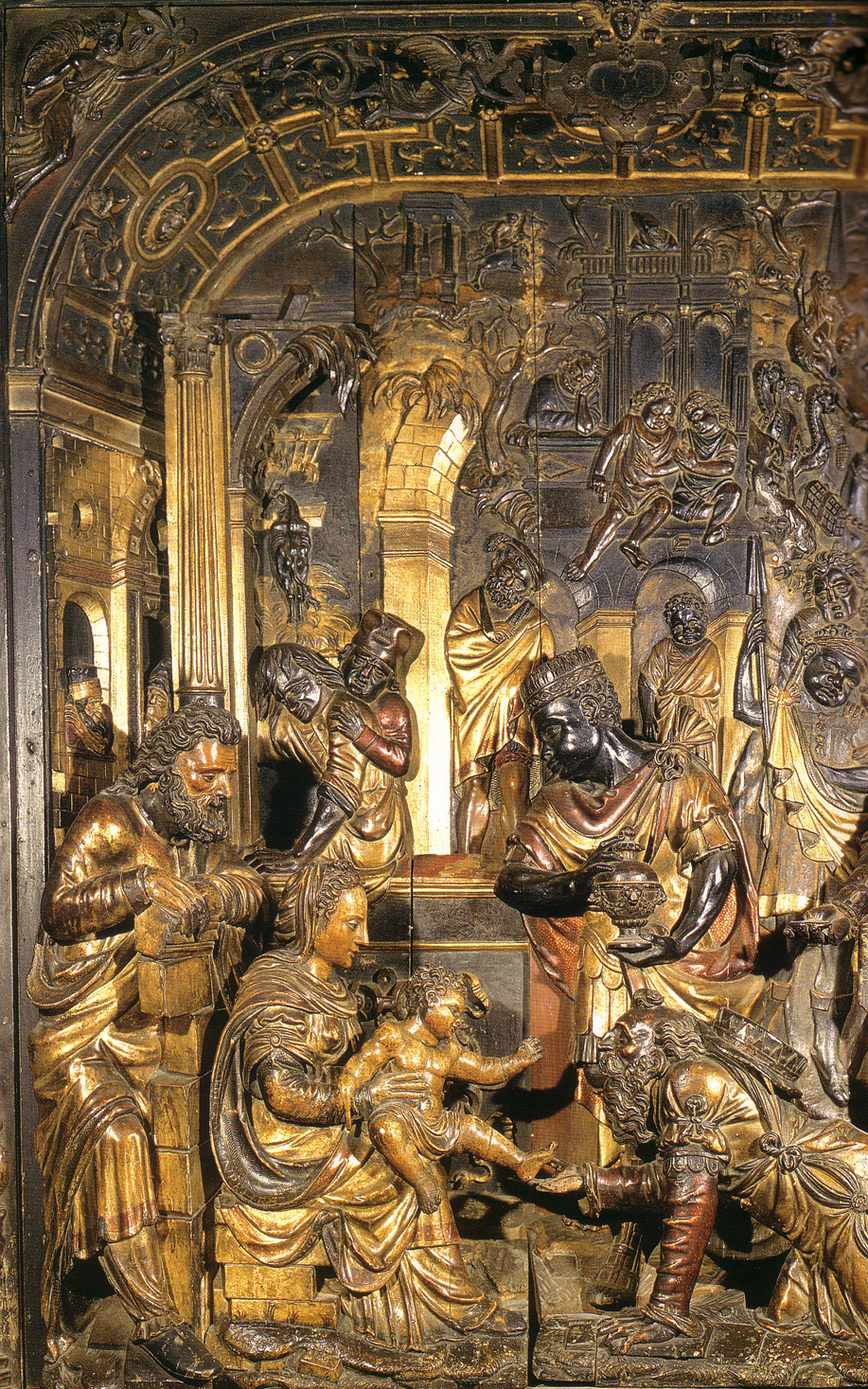 Adoración de los Reyes. Altorrelieve tallado en Amberes en 1554 en estilo romanista.